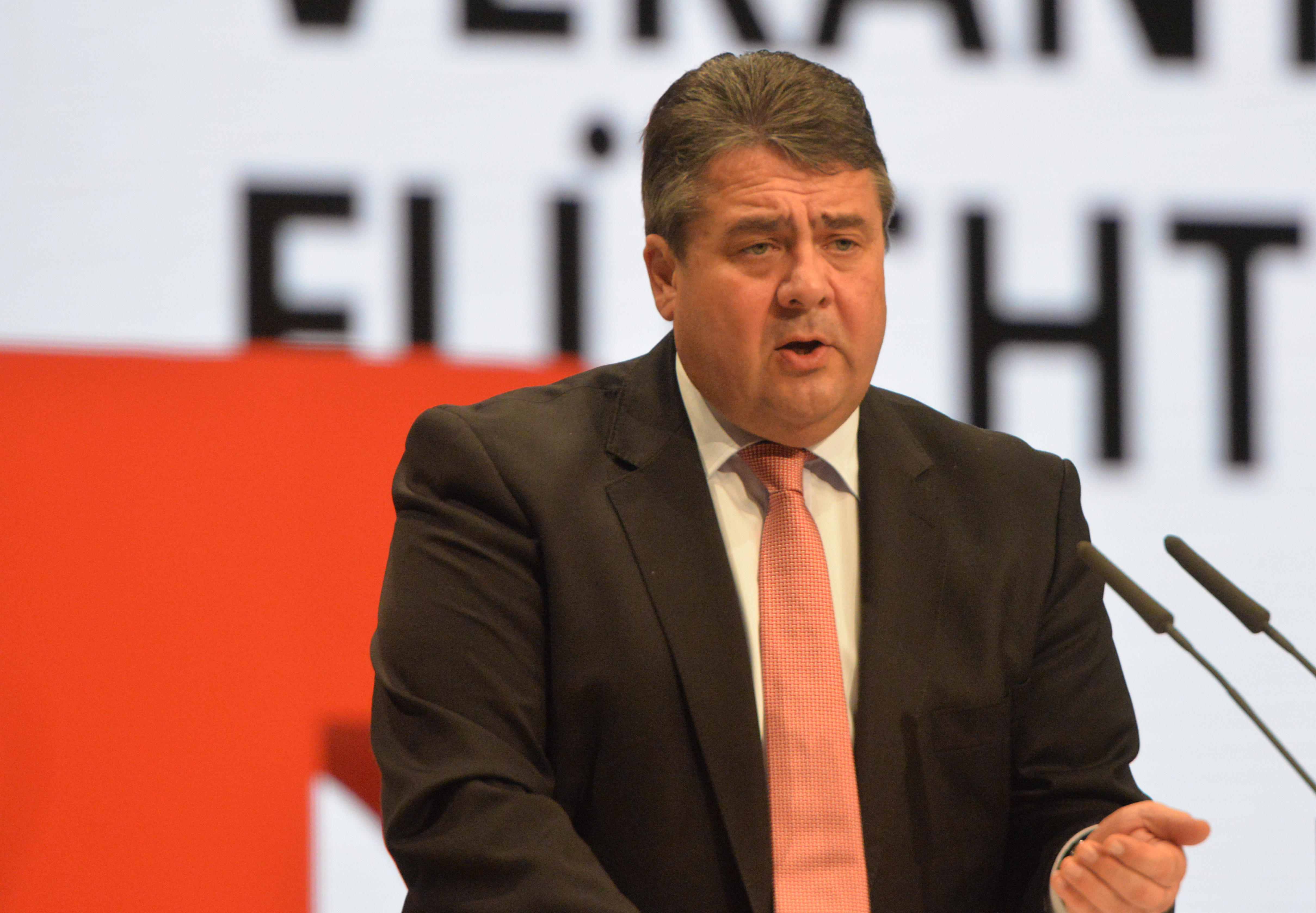 SPD Bundesparteitag Berlin, 10.-12. Dezember 2015, CityCube, Messe Berlin